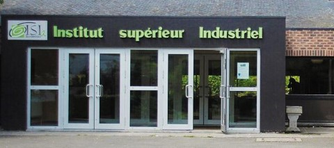 Hall d'entrée de 1983 de l'ISIa